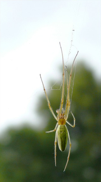 Tetragnatha pinicola. Photograped in Belarus.